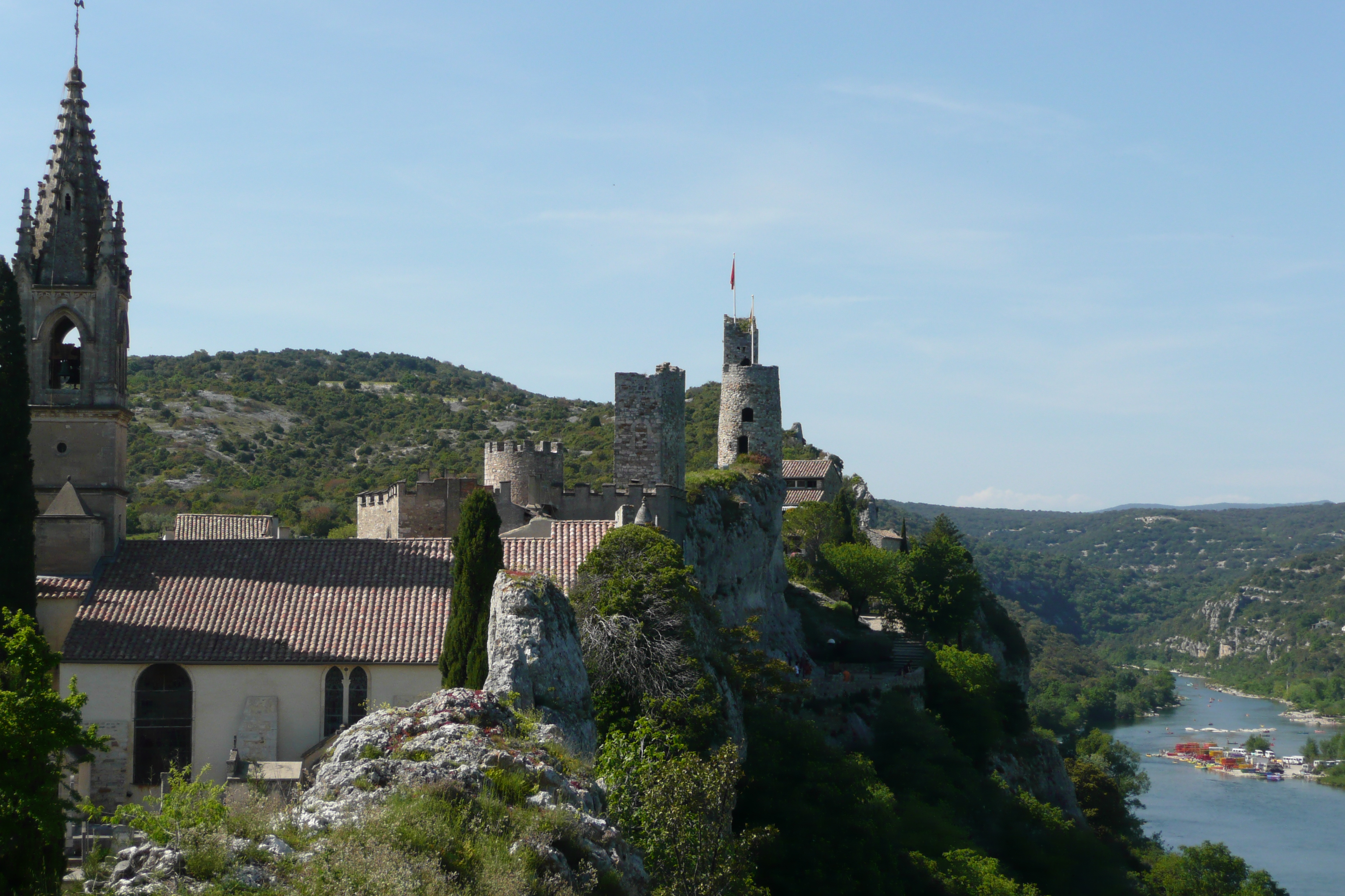 Eglise à Aiguèze.